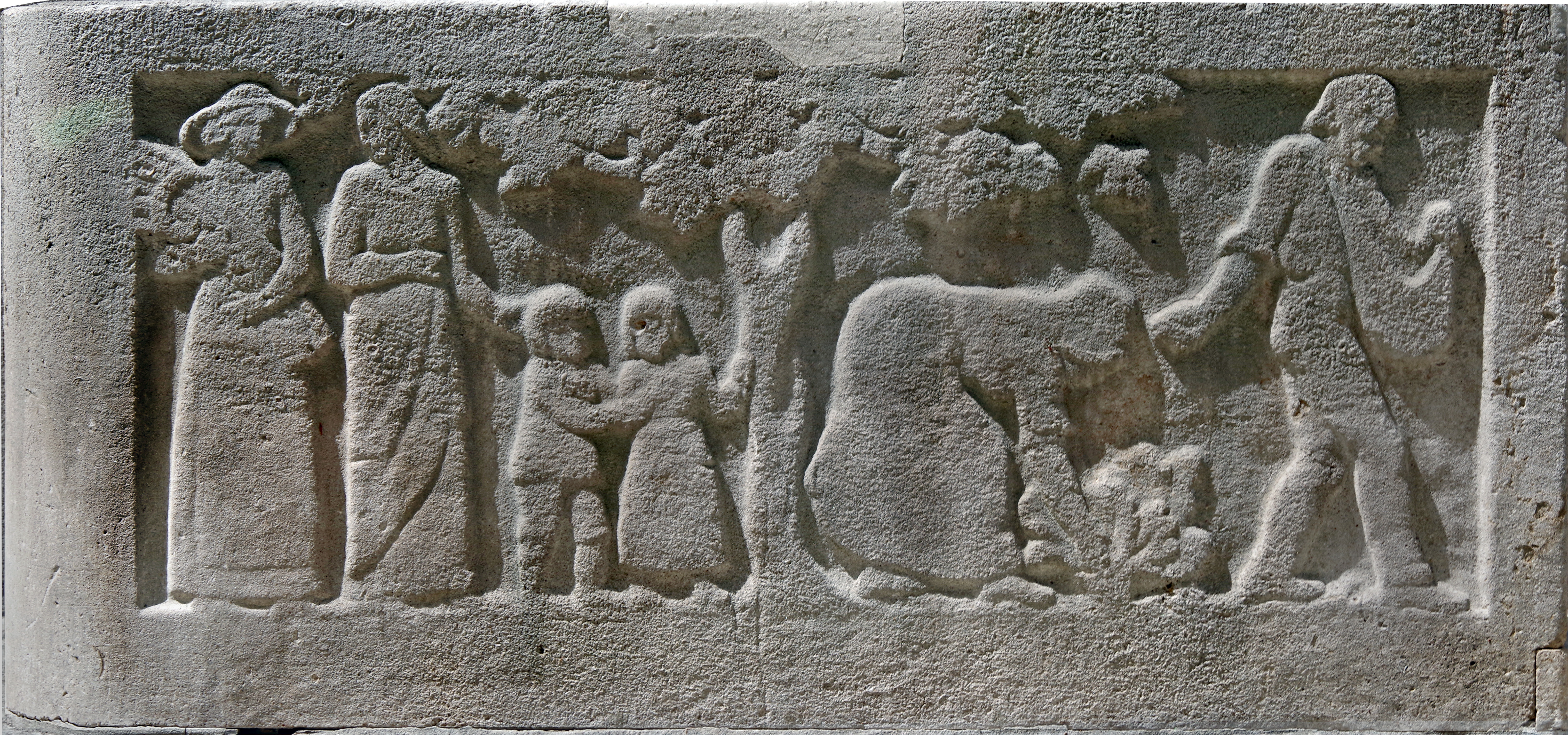 Reformationsdenkmal an der Südfassade der Hospitalkirche in Stuttgart, Relief der rechten Brüstungsmauer.